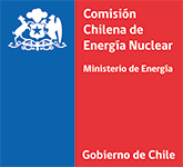 Logo de CCHEN